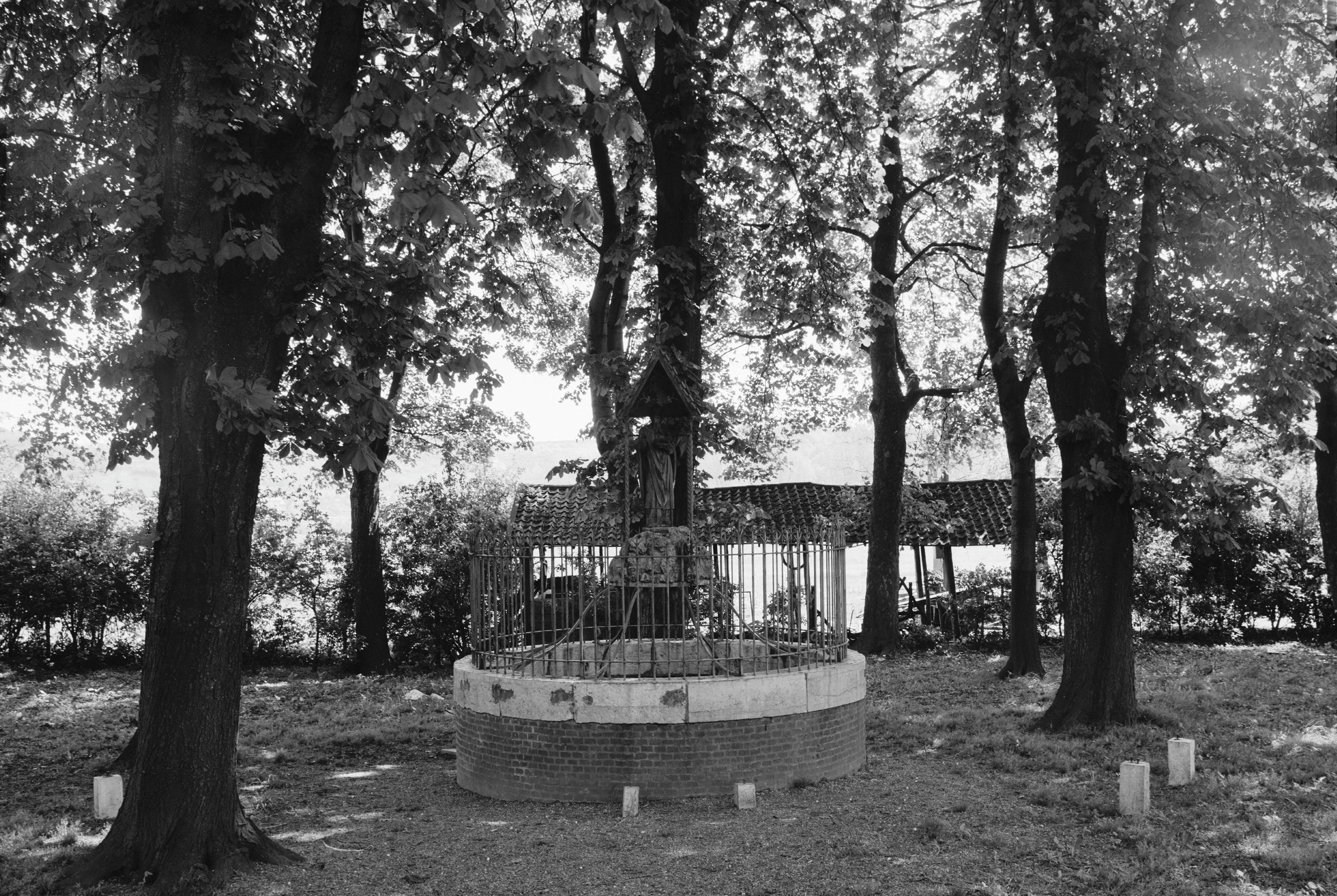 Sint Servatiusbron: Jekerdal, aanzicht